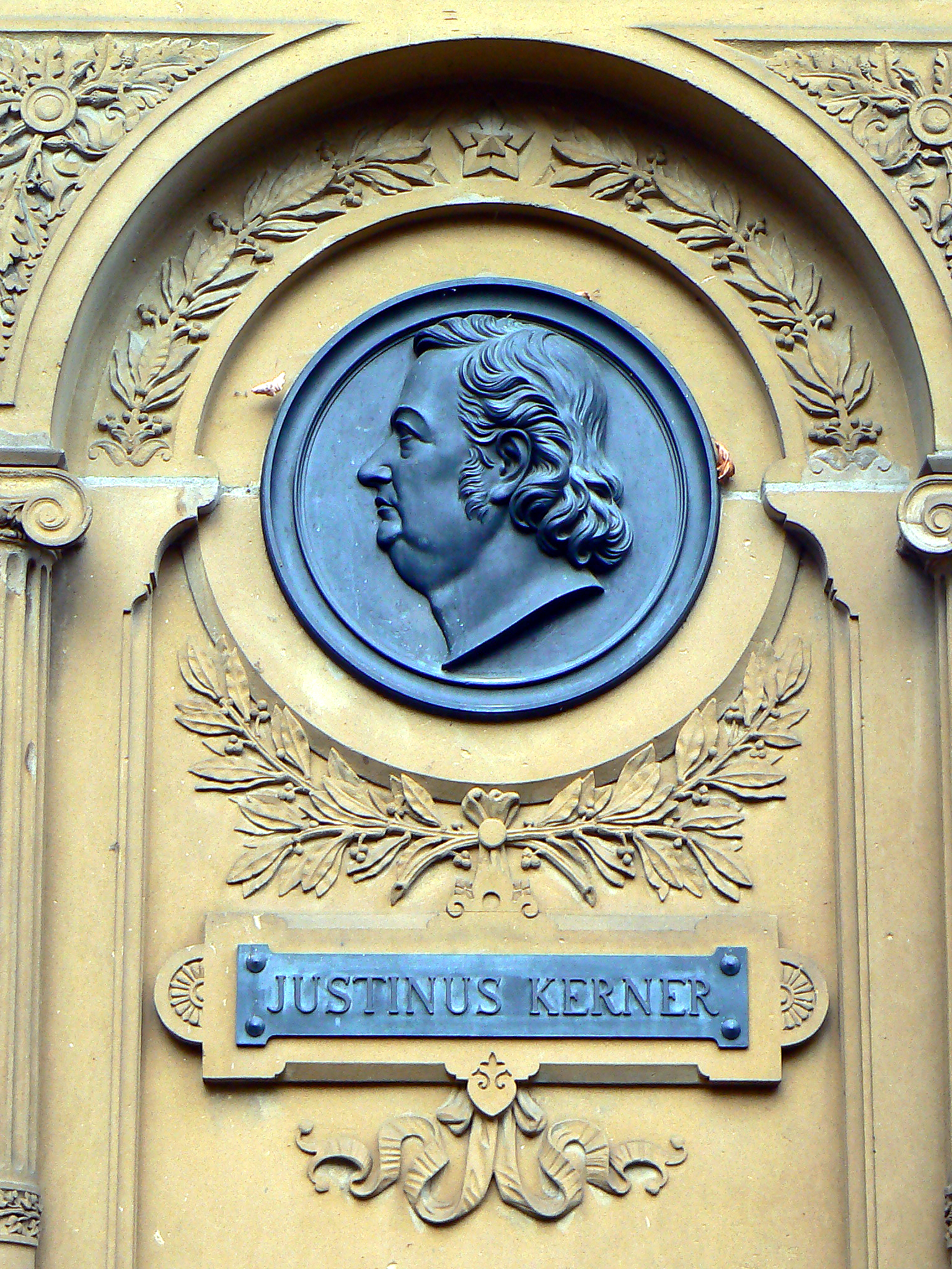 Detail des Kernerdenkmals in Weinsberg